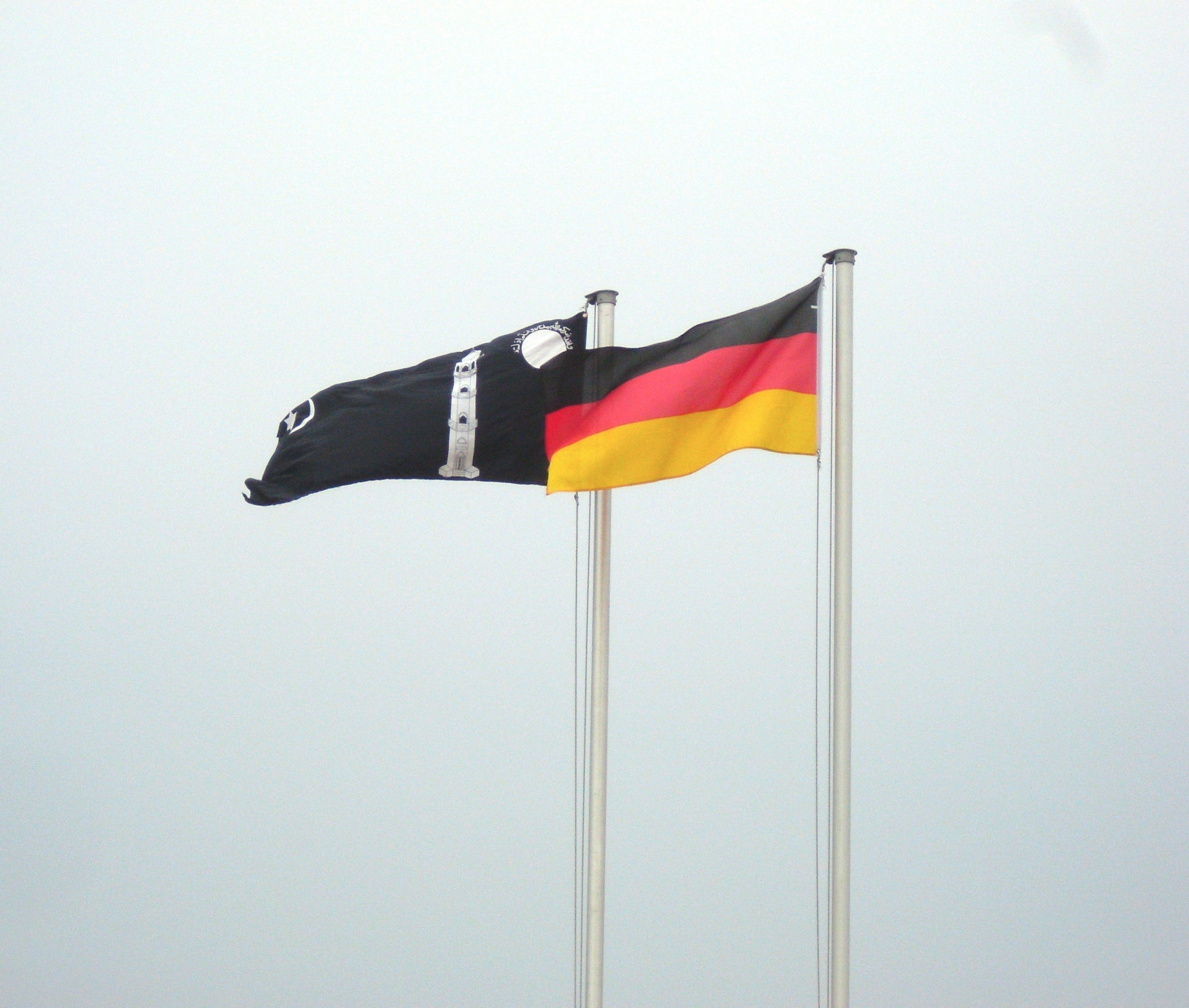 Liwa-e-Ahmadiyya mit der Flagge Deutschlands auf der Jalsa Salana 2008 Deutschland